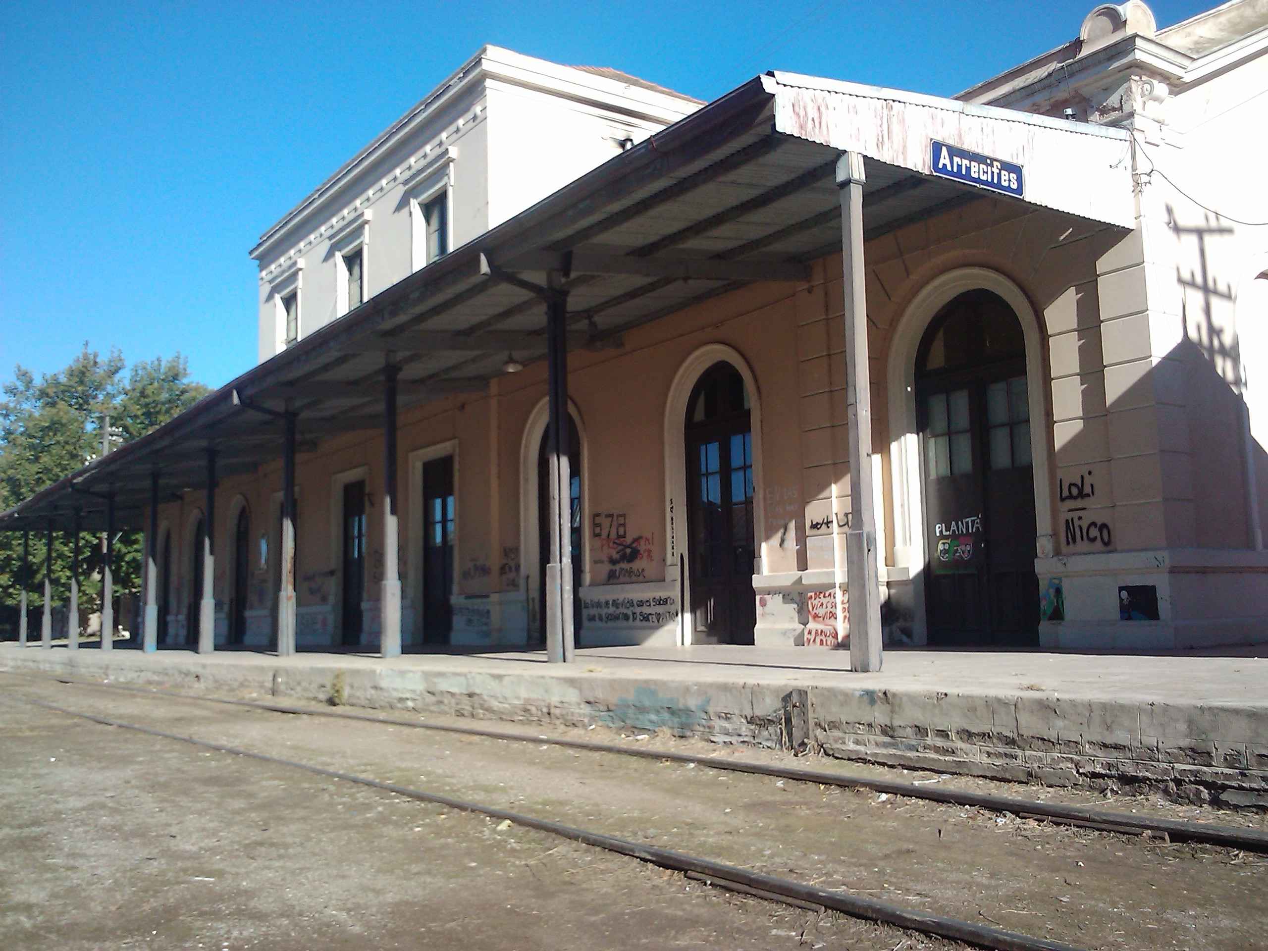 Estacion Arrecifes desde las vias.